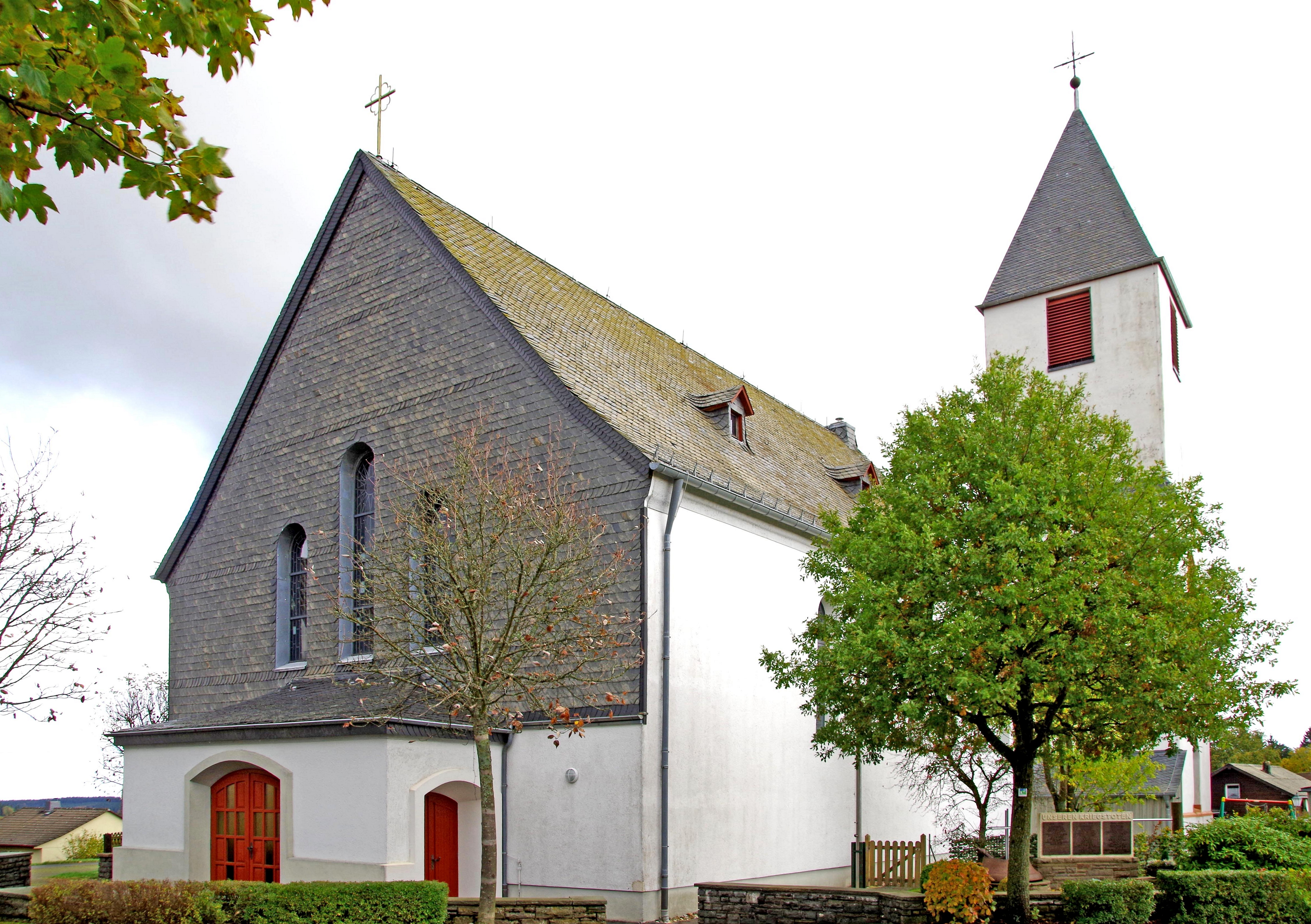 St. Bernhard (Hollerath), Außenansicht